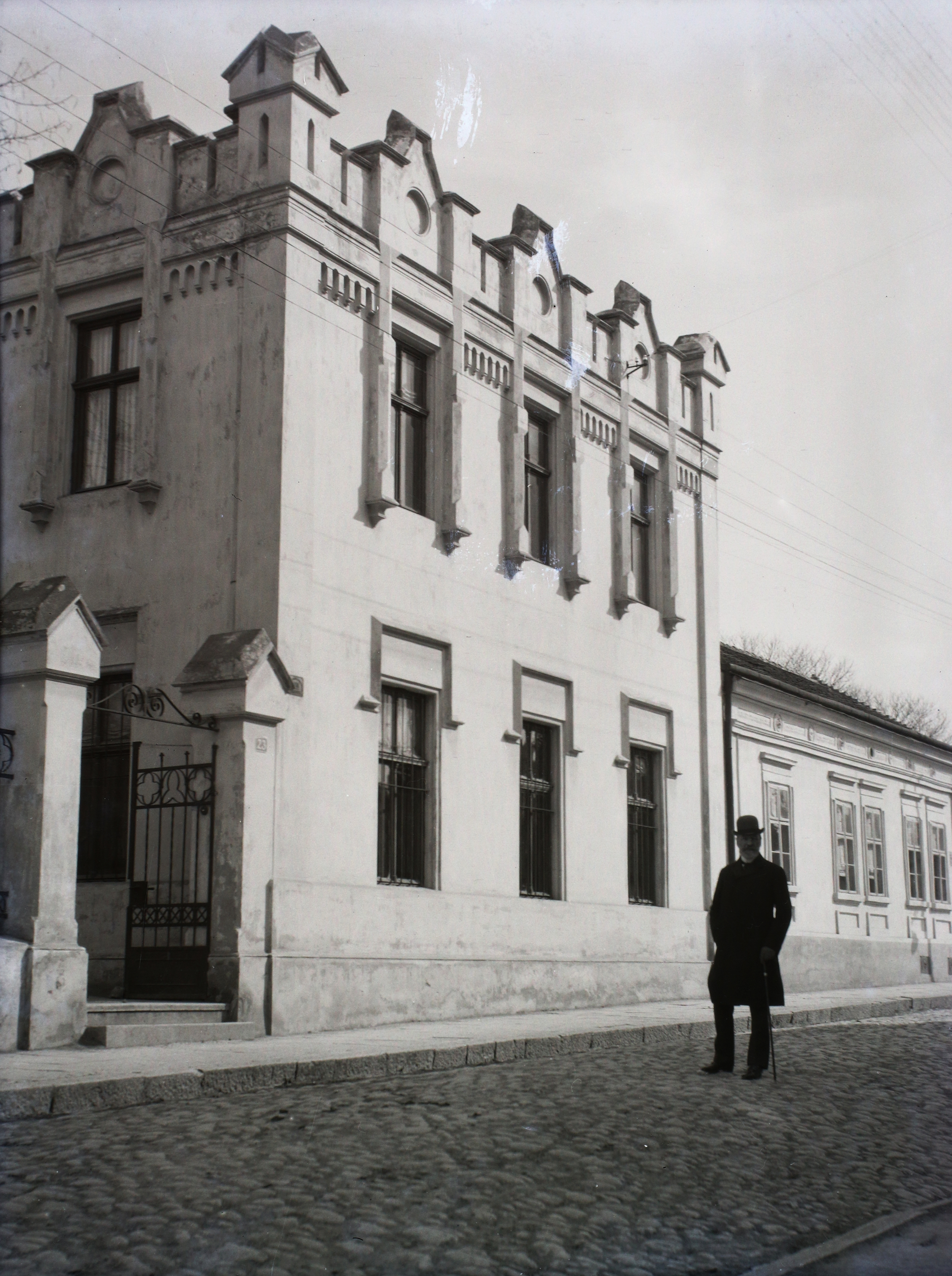 Krunska utca 23. Krisztus király templom. Location: Serbia, Belgrade Tags: church, man, hat, walking cane Title: Krunska utca 23. Krisztus király templom.